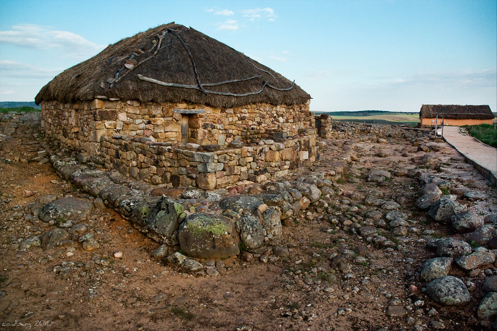 Numancia